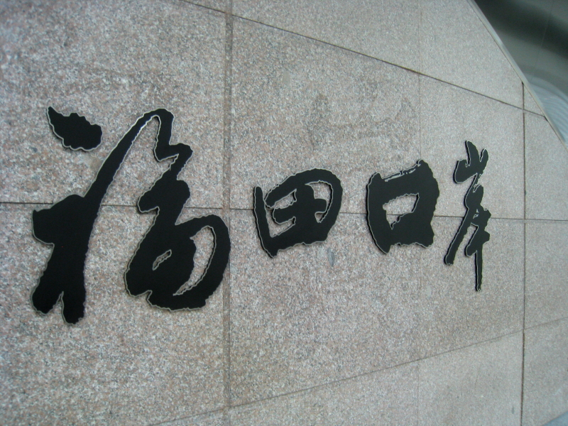 Shenzhen Metro Terminal Futiankouan Station Ident